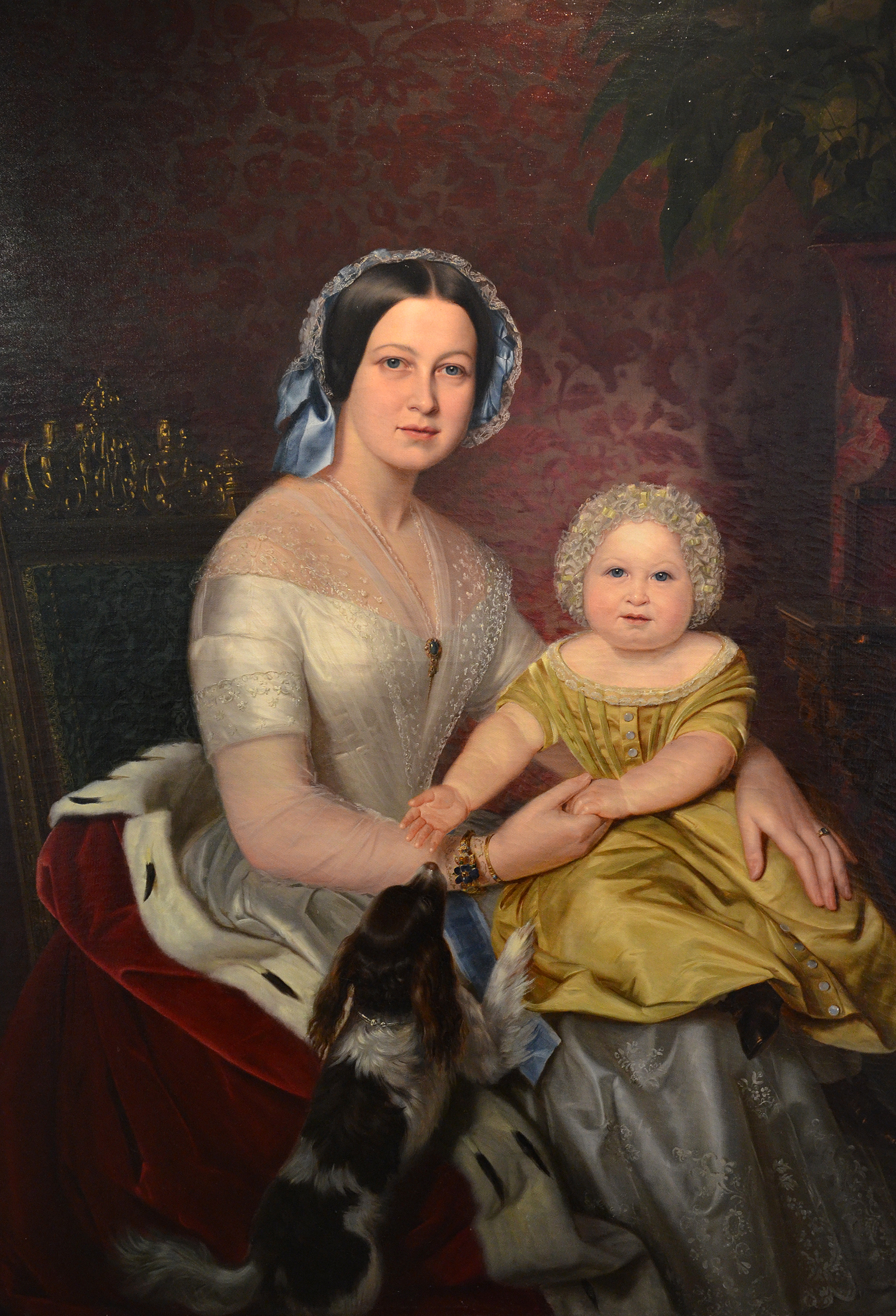 "Marie, Königin von Hannover und Kronprinz Ernst August von C. Oesterley", Ölgemälde des Professors und hannoverschen Hofmalers Osterley, hier im Diakoniekrankenhaus Henriettenstiftung, um 1846 ...